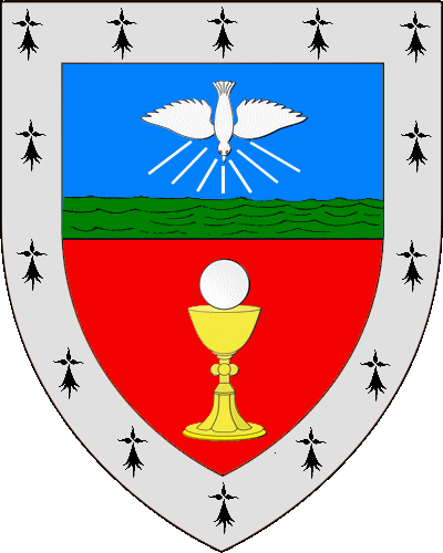 Troc'het : ouzh 1 en glazur e Spered-santel en argant nijant a-us ur mor geotet; ouzh 2 en gul e c'halir en aour e ostiz en arc'hant difoupant; e vevenn en erminoù